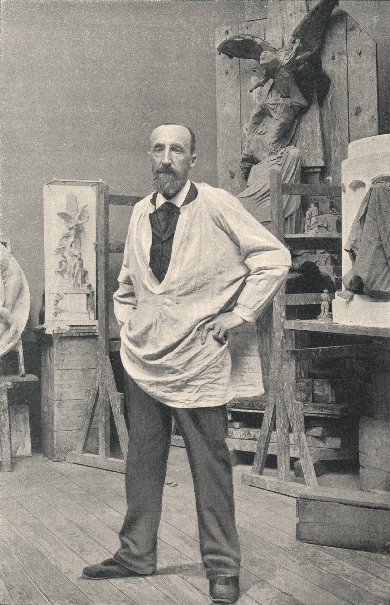 Photographie de Jules Dalou dans son atelier de l'impasse du Maine à Paris.